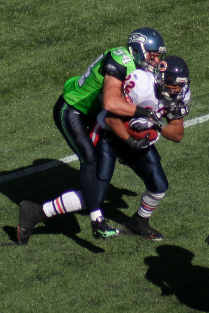 Will Herring tackling Matt Forté